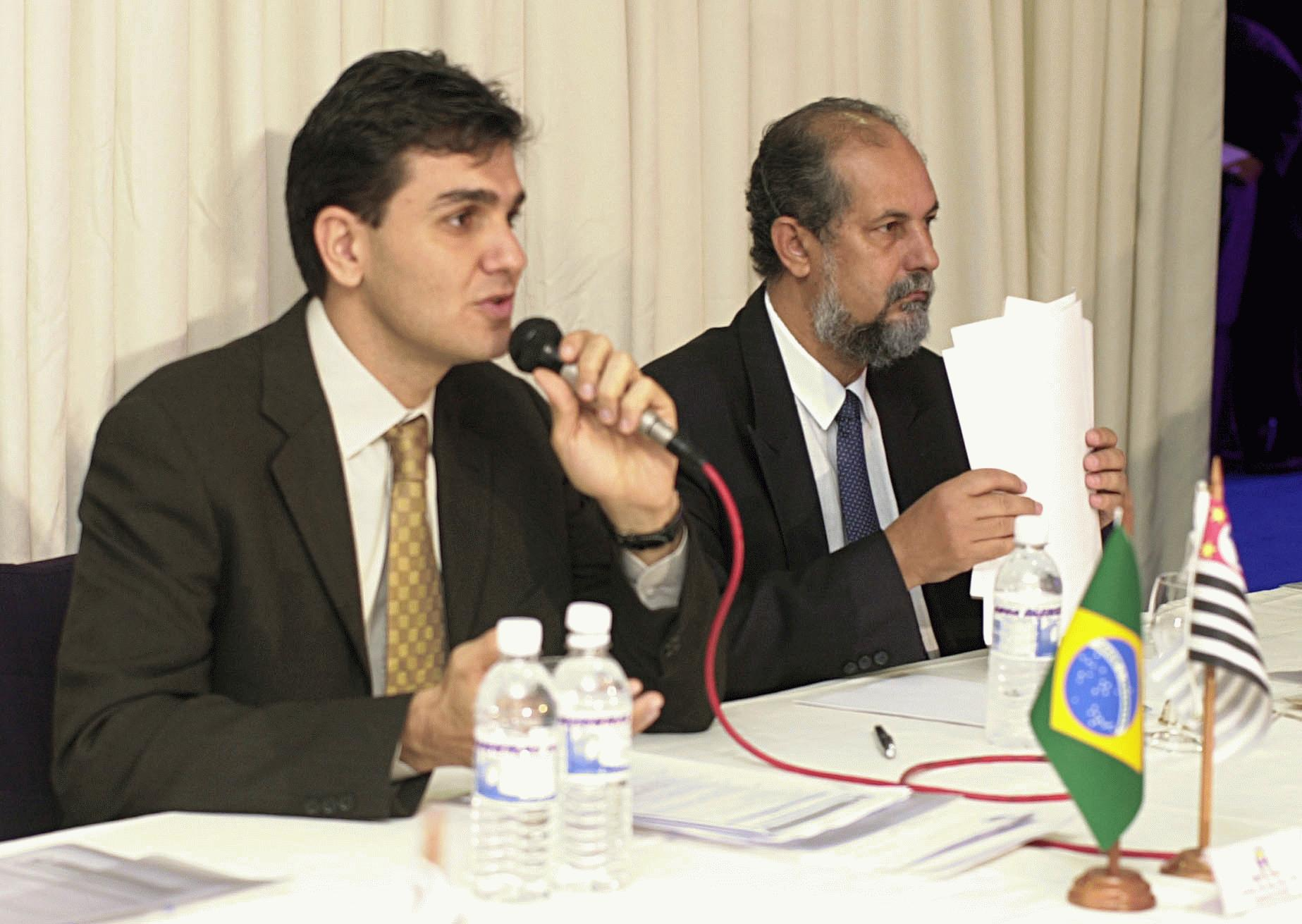 Brasília, 10/7/2003 (Agência Brasil - ABr) - O presidente do Conselho Nacional de Secretários de Educação (Consed), Gabriel Chalita, fala durante a primeira reunião extraordinária do conselho, ao lado do secretário de Educação da Paraíba, Neroaldo de Azevedo (Foto: Gervásio Baptista/ABr - hor - 10)